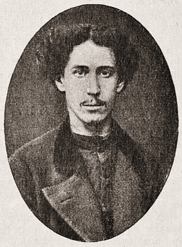 Leonid Petrovič Bulanov